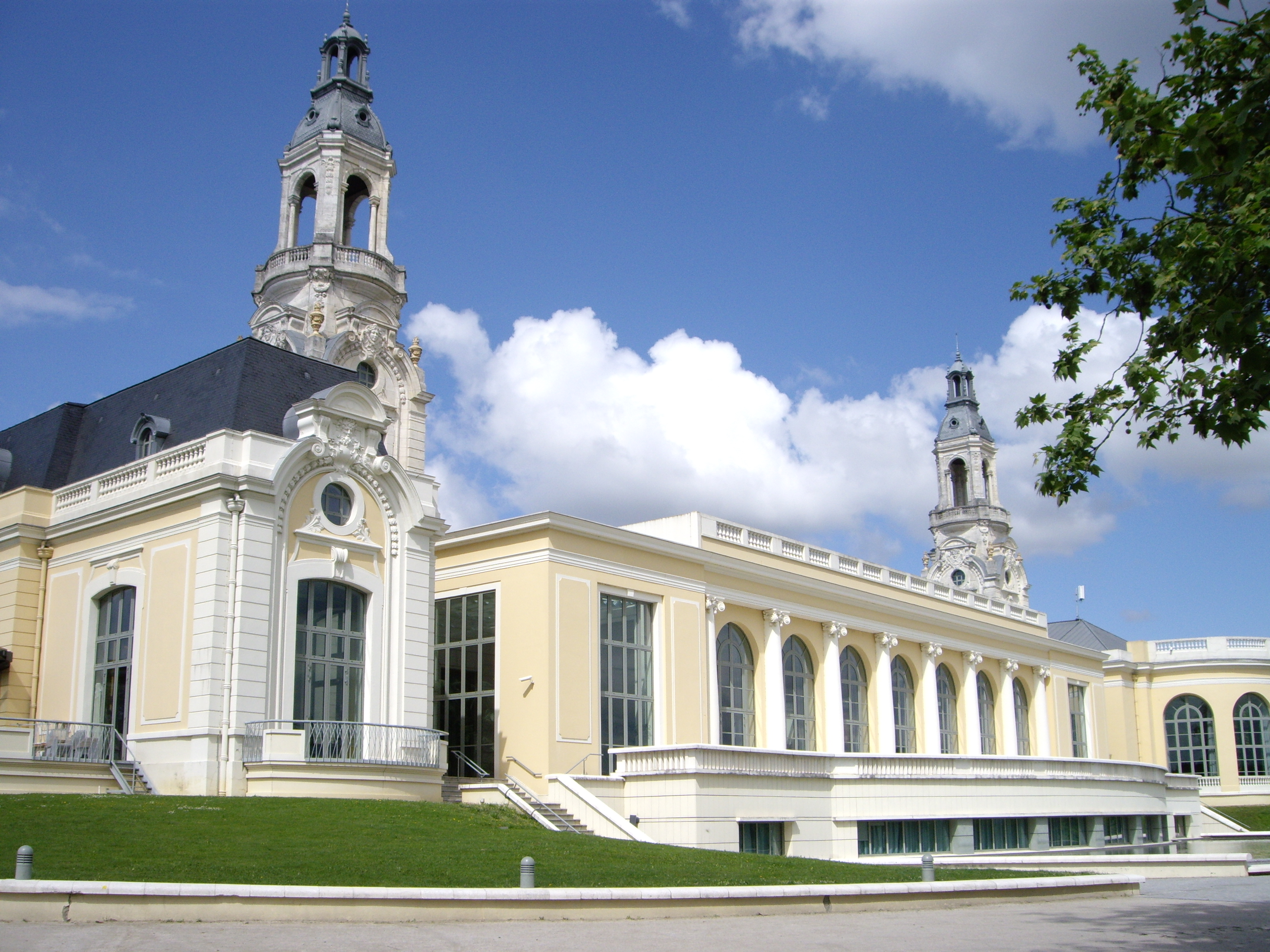 Le Palais Beaumont est, à Pau, à la fois un centre de congrès et un casino. Originellement dénommé Palais d'Hiver, il voit le jour à la fin du XIXe siècle. Mélangeant les styles architecturaux, il est plusieurs fois remanié et, après un demi-siècle d'oubli, il est, en 1996, restauré par l’architecte François Lombard.